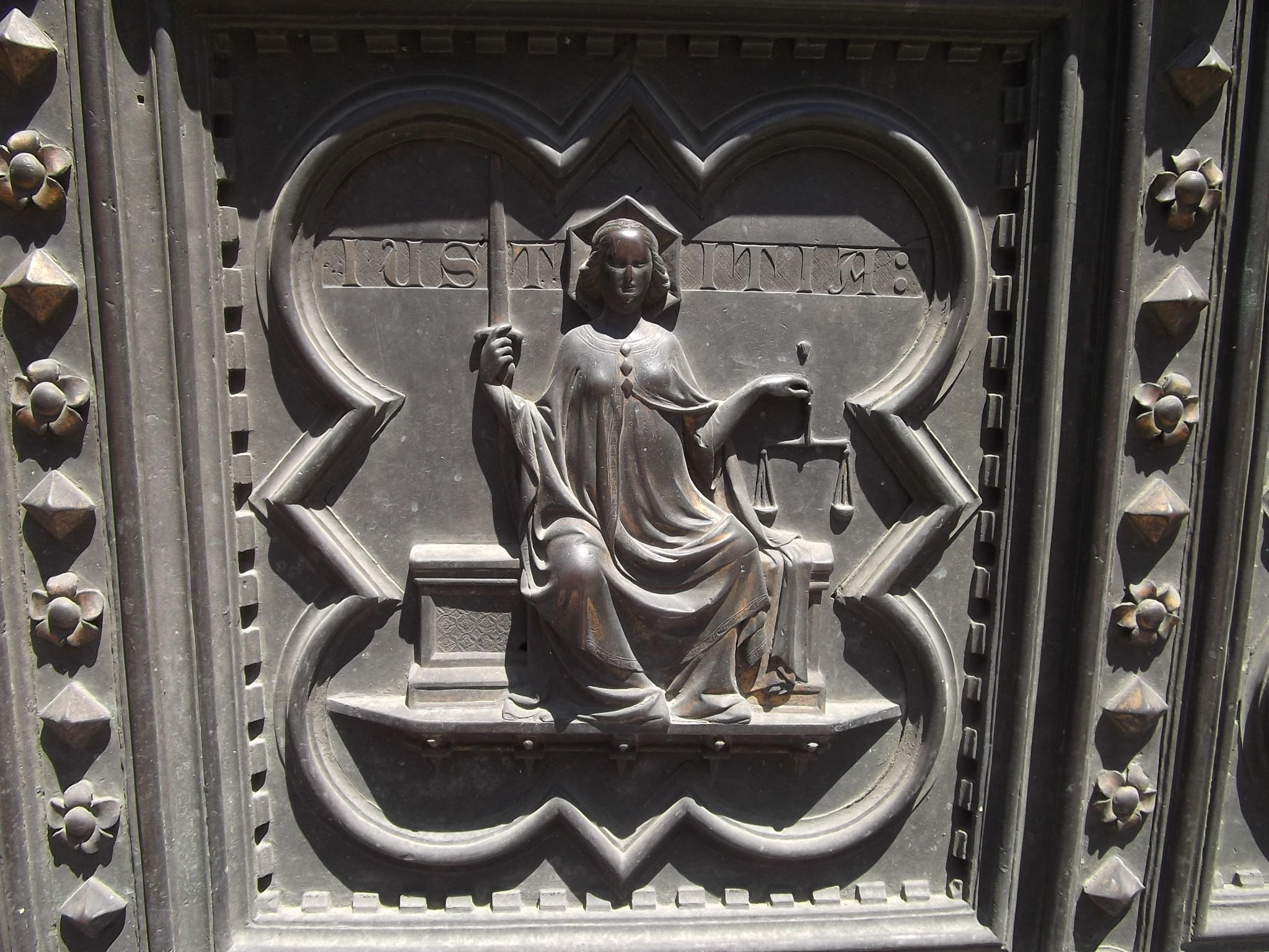 Justitia auf dem Portal des Baptisterium San Giovanni in Florenz